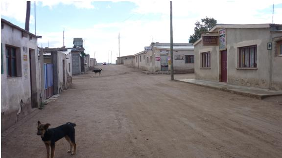 Calle central de San Juan del Rosario, Municipio de Colcha K, Provincia de Nor Lípez, Departamento de Potosí, Bolivia.